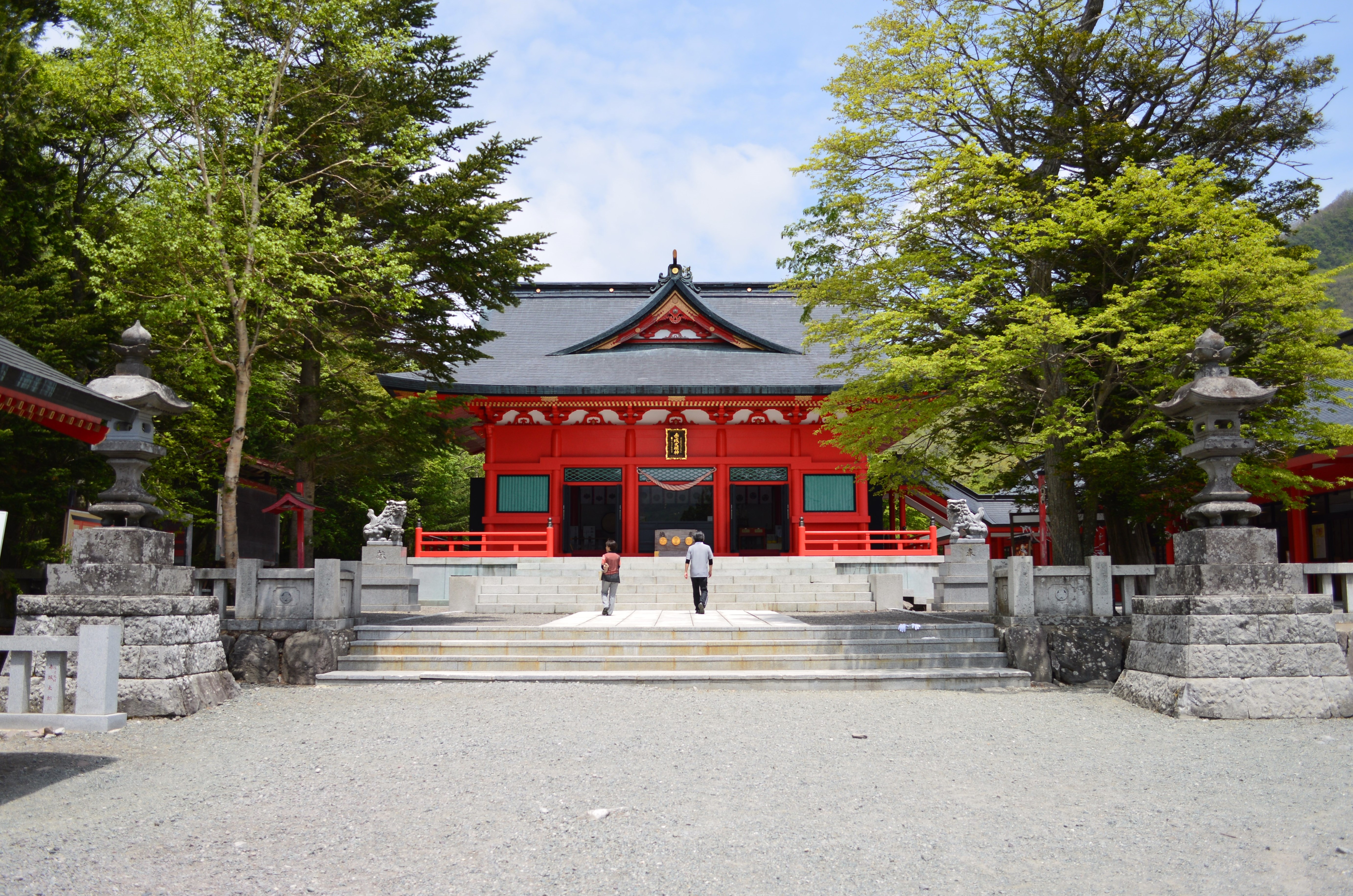 大洞赤城神社 正面